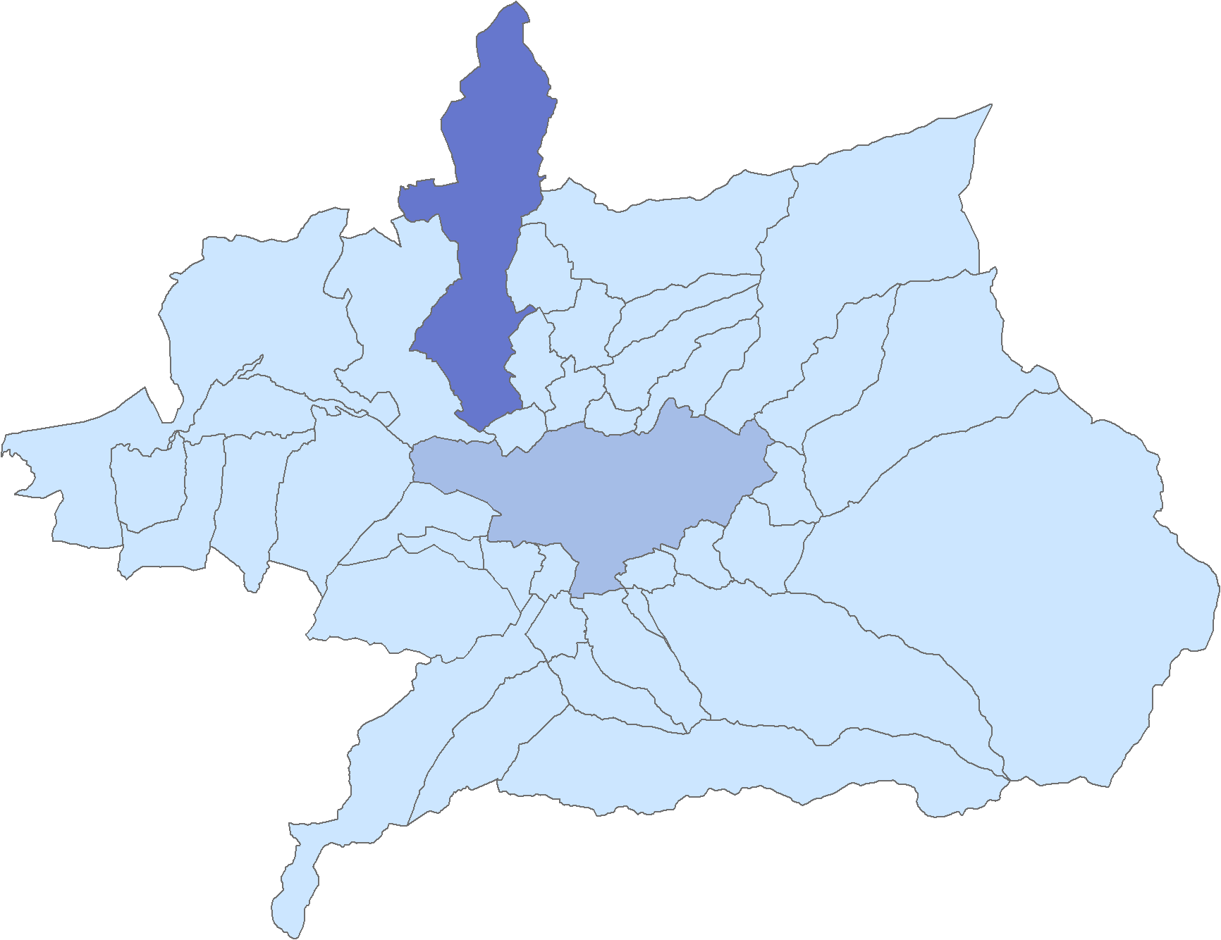 Situación del municipio de Albolote respecto a la comarca de la Vega de Granada, en España.